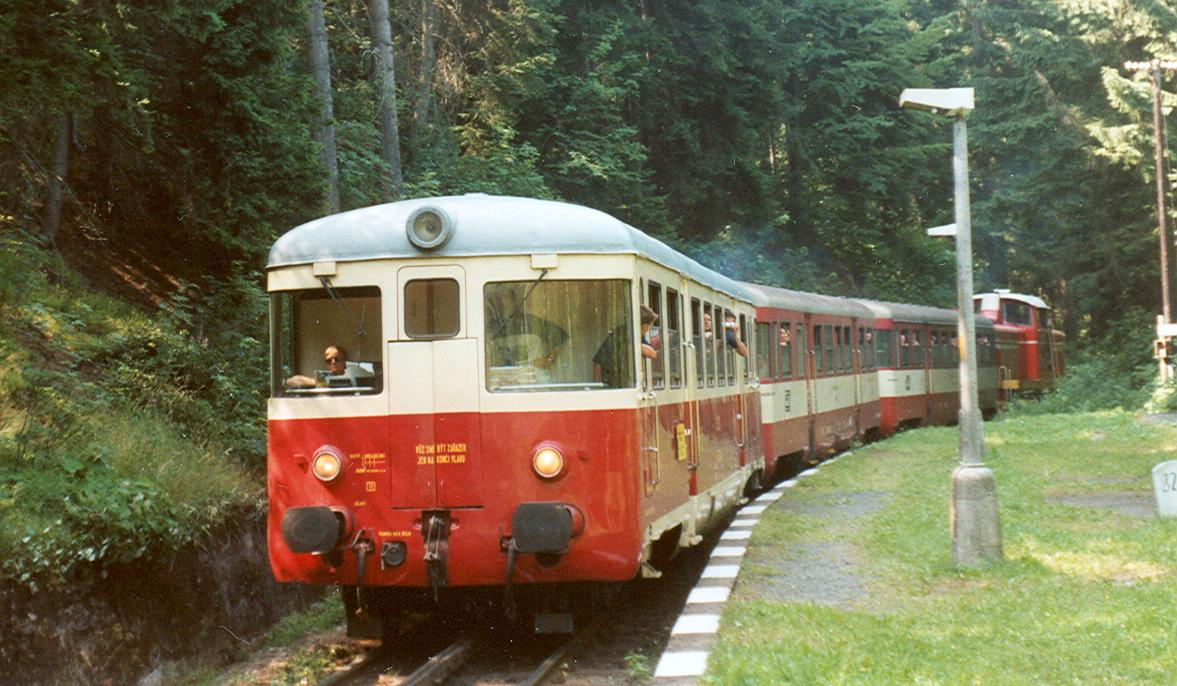 Sonderzug mit führendem M 240.0 bei Kořenov zastávka